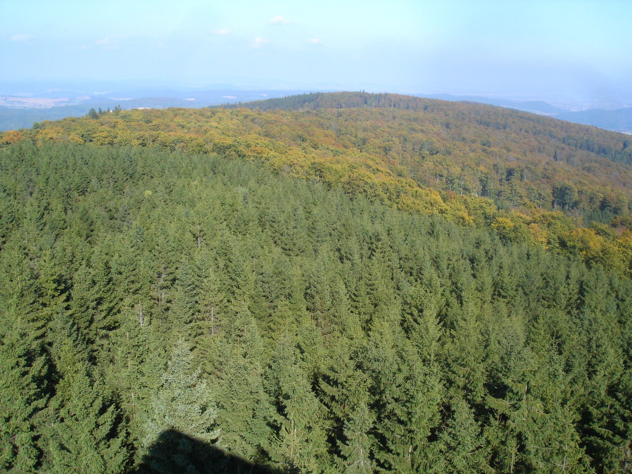 Der Hunsrück im Kellerwald vom Kellerwaldturm auf dem Wüstegarten aus gesehen.